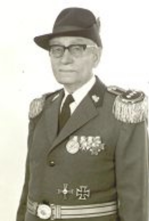 August Grothuess